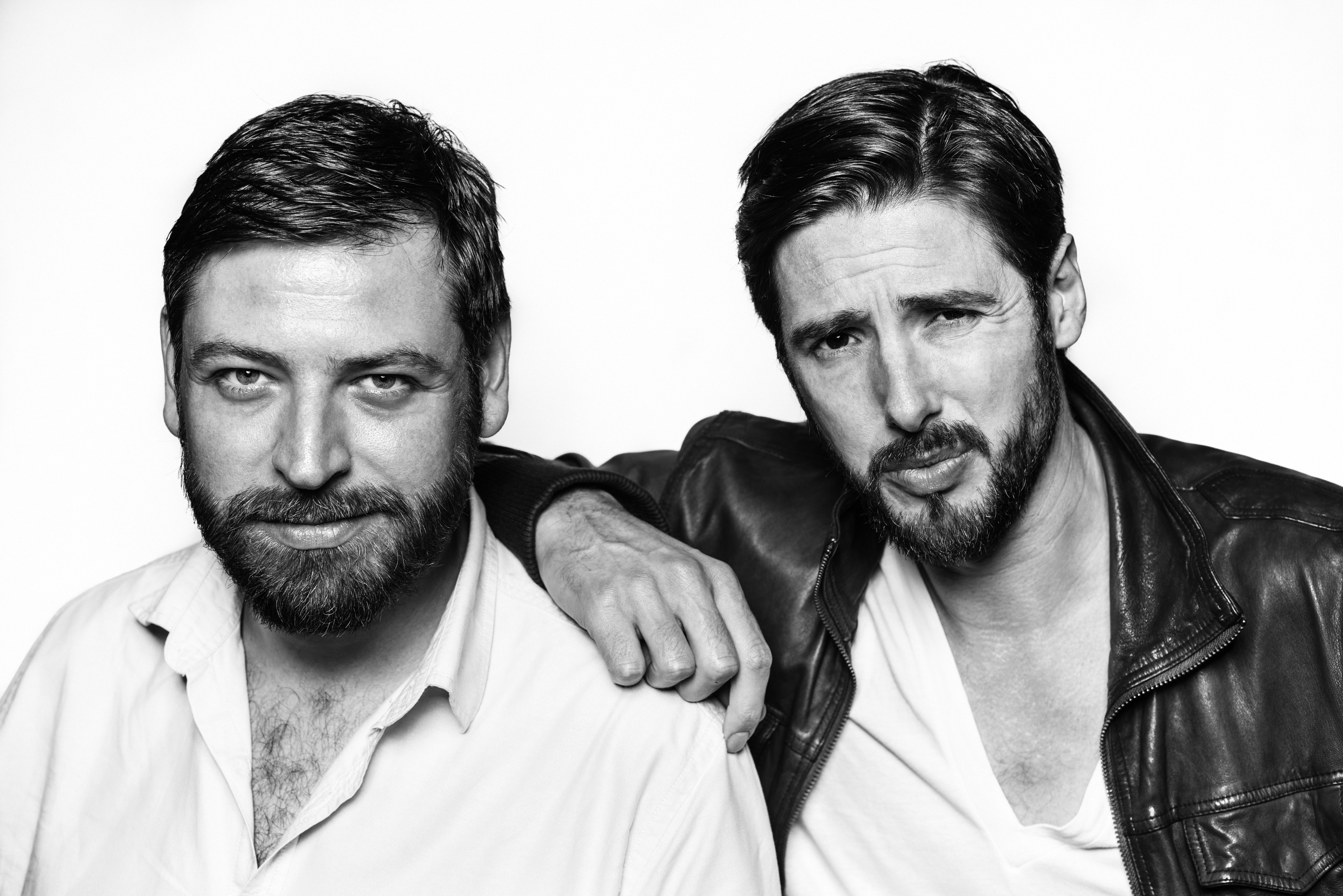 Tobi & Kowe